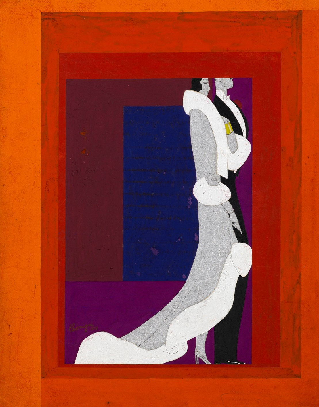 Gouache, über einer Bleistift-Hintergrund-Zeichnung, Papier auf einem Untergrund aufgelegt. Links unten signiert und datiert Template:Zitatlbénigni / 1929 Mit Bleistift rückseite beschriftet „La Donna“ Bildmaße 328 x 257 mm, Maße des Blattes 350 x 264 mm